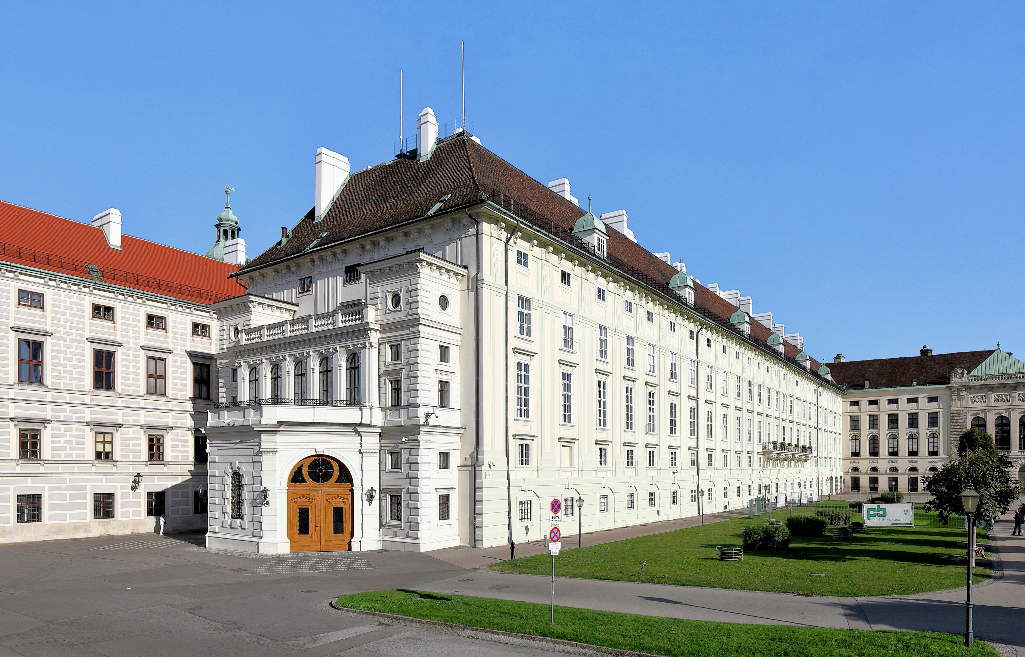 Westansicht des Leopoldinischen Traktes der Hofburg in der österreichischen Bundeshauptstadt Wien.Das Verbindungsgebäude zwischen der Amalienburg und dem Schweizertrakt wurde unter Kaiser Leopold I. in den 1660er Jahren erbaut. Der Architekt war Filiberto Lucchese, die Ausführung oblag den italienischen Baumeistern Carl Martin und Dominico Carlone. 1668 brannte der Palast ab und wurde umgehendst wieder aufgebaut. Nach der Zweiten Wiener Türkenbelagerung 1683 wurde der Trakt von Giovanni Pietro Tencala neu aufgebaut und um eine Etage aufgestockt. 1752 erfolgte der Zubau eines Balkons durch die Hofsteinmetzmeister Elias Hügel und Johann Baptist Regondi.Da die alte Präsidentschaftskanzlei im Kanzleramt durch einen Bombentreffer unbenützbar geworden war, übersiedelte Ende 1946 die Präsidentschaftskanzlei in den Leopoldinischen Trakt.